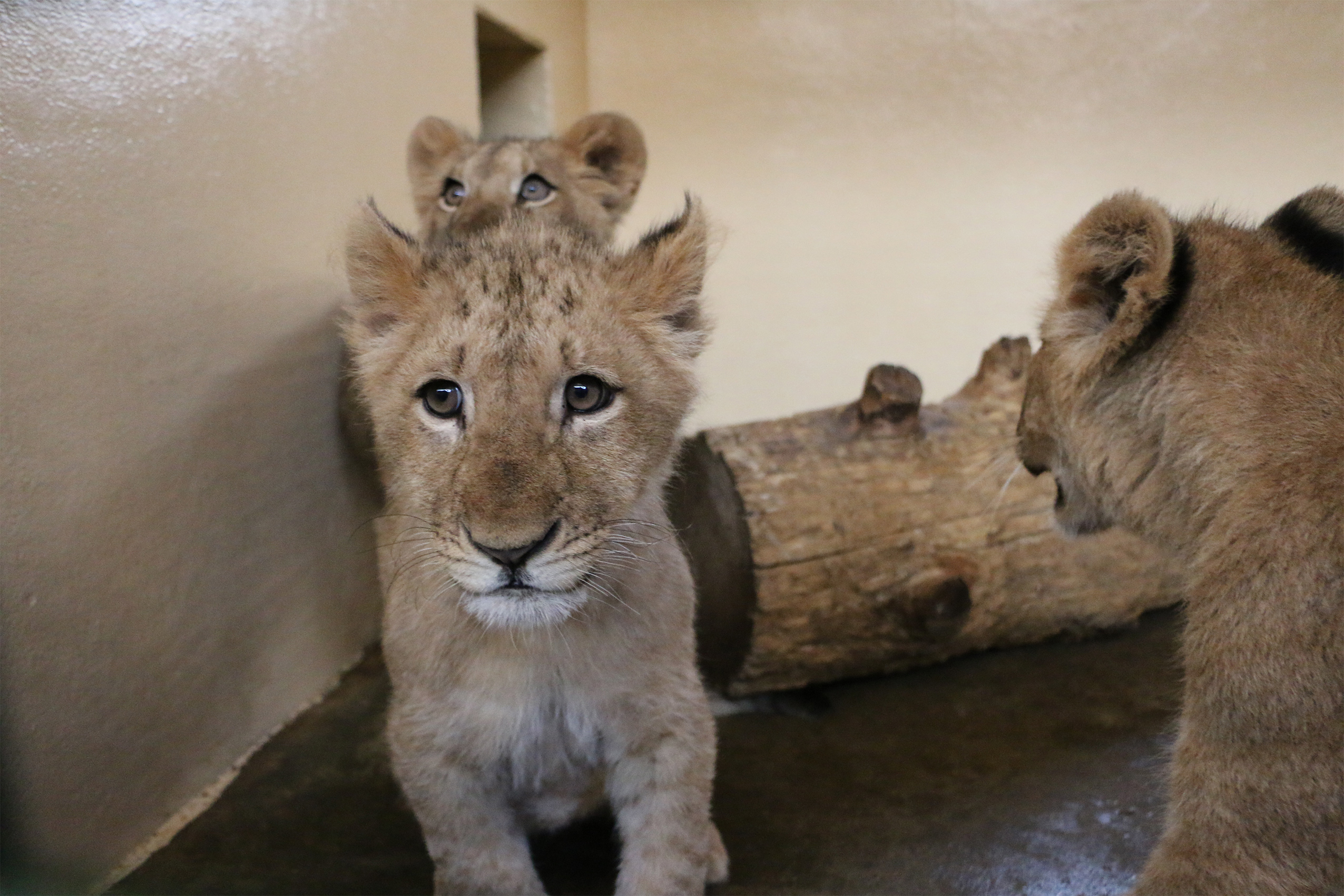 Les trois lionceaux issus du trafic d'animaux, recueillis par l'association début 2020.